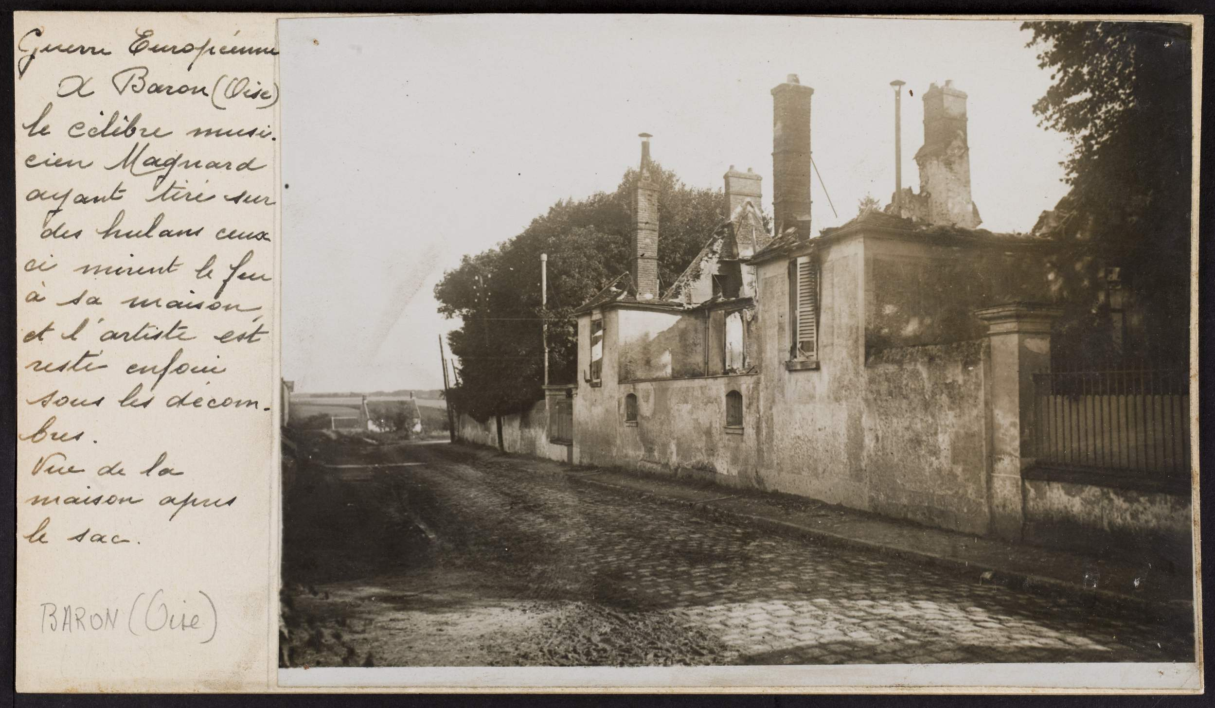 A Baron (Oise), le musicien Magnard ayant tiré sur les hulans, ceux-ci mirent le feu à sa maison. L'artiste est resté enfoui sous les décombres. Vue de la maison après le sac.